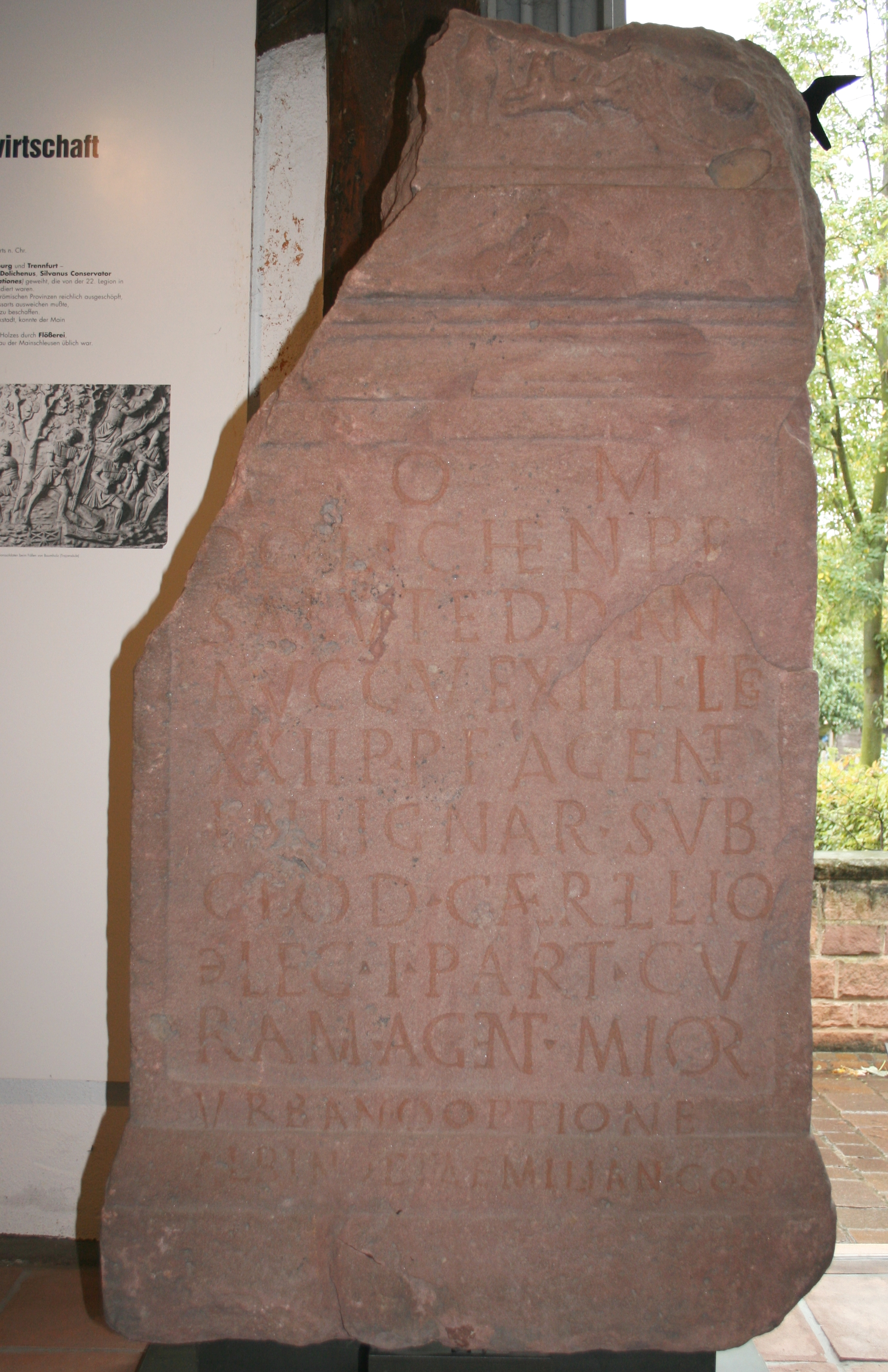 Römische Inschrift aus Obernburg am Main, ausgestellt im Römermuseum Obernburg. Hinweis auf Holzfällerkommando der Legio XXII Primigenia. Lit.: Helmut Castritius, Manfred Clauss, Leo Hefner: Die Römischen Steininschriften des Odenwaldes (RSO). Beiträge zur Erforschung des Odenwaldes 2, 1977, S. 237–308. Nr. 28: I(ovi) O(ptimo) M(aximo)/ Dolichen(o) pr[o]/ salute dd(ominorum) nn(ostrorum)/ Augg(ustorum) vexill(atio) leg(ionis)/ XXII P(rimigeniae) P(iae) F(idelis) agent(ium)/ in lignar(iis) sub/ Clod(io) Caerellio ) (centurione) leg(ionis) I Part(hicae) cu/ram agent(e) Maior(io) Urbano optione/ [A]lb[in]o et Aemil[iano] co(n)s(ulibus)